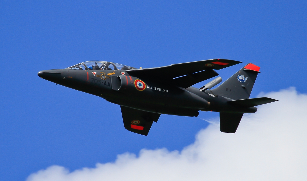 A Dassault/Dornier Alpha Jet